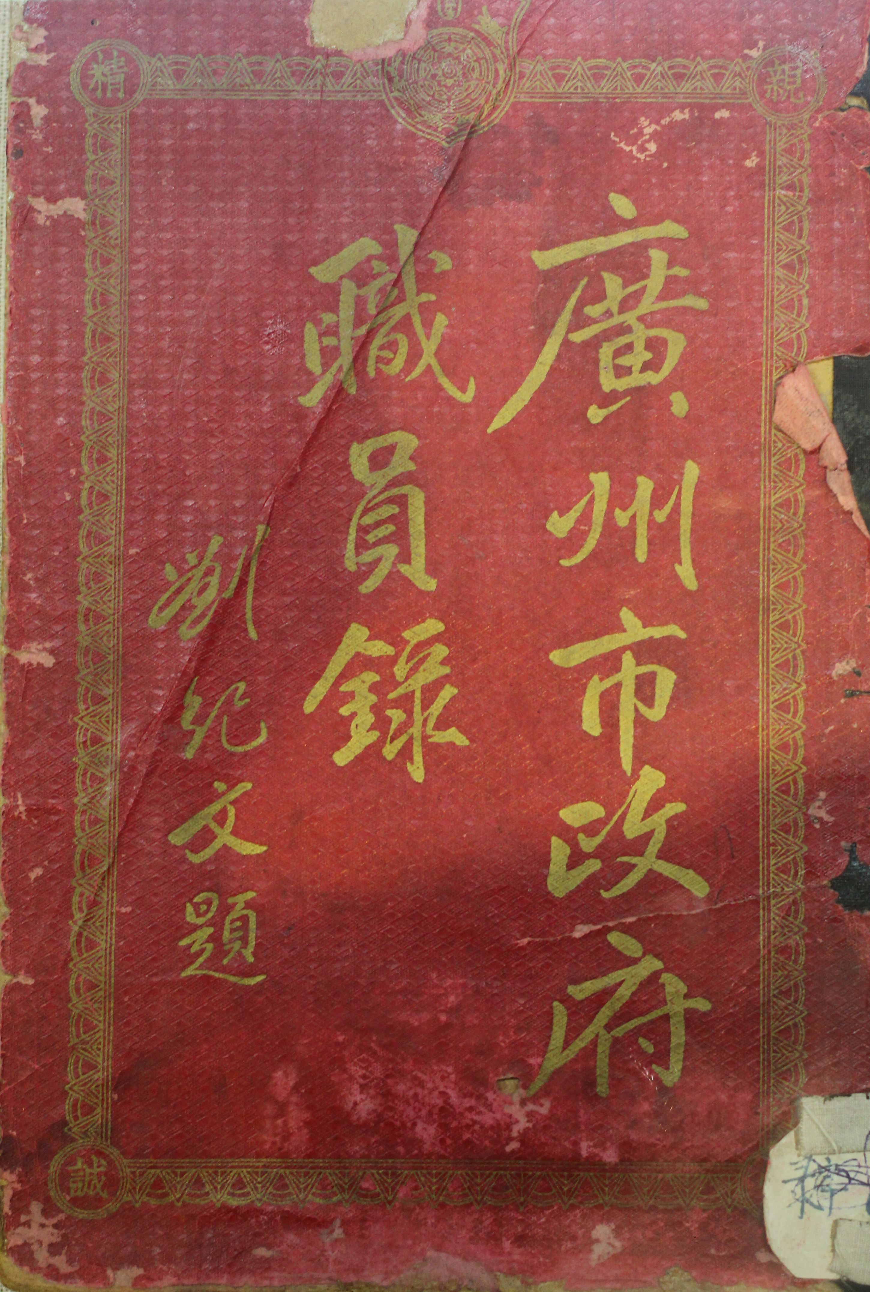 《廣州市政府職員錄》。劉紀文題。